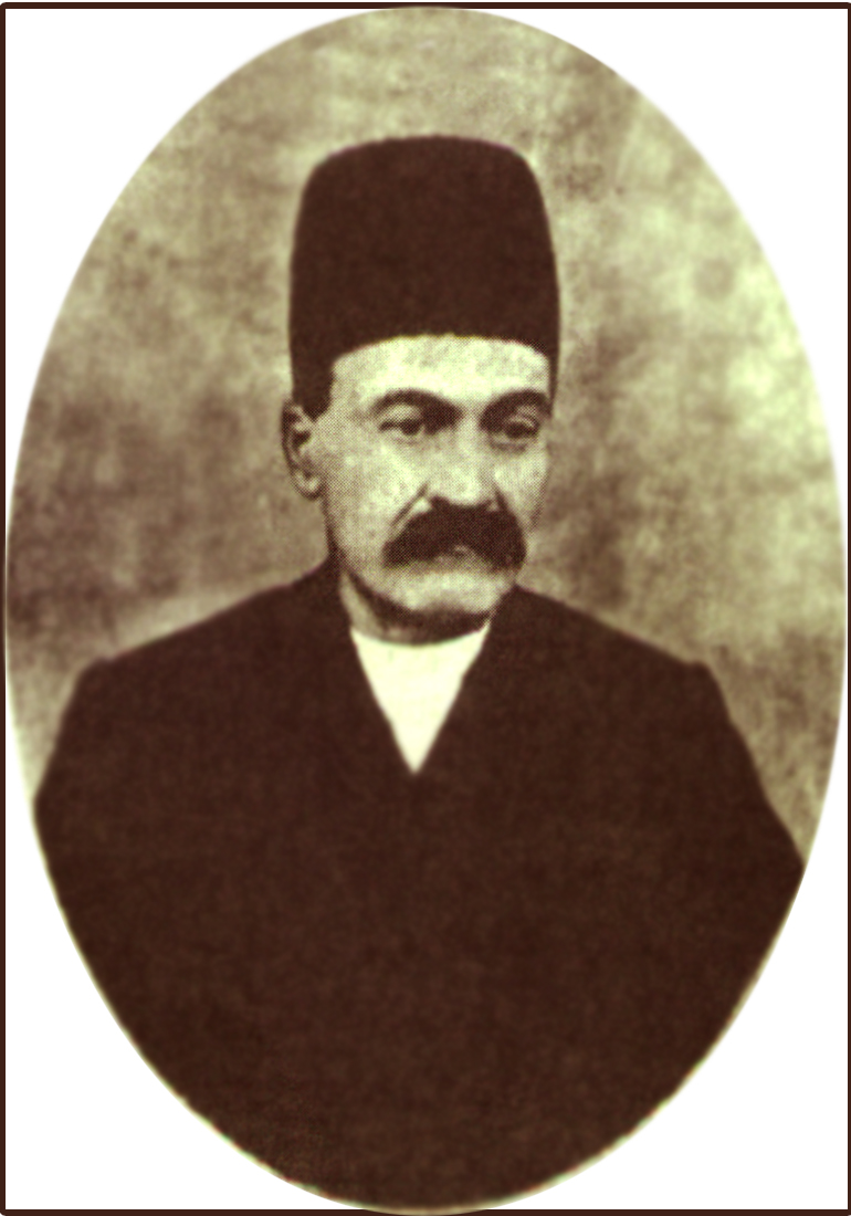 معتمد دیوان کواری